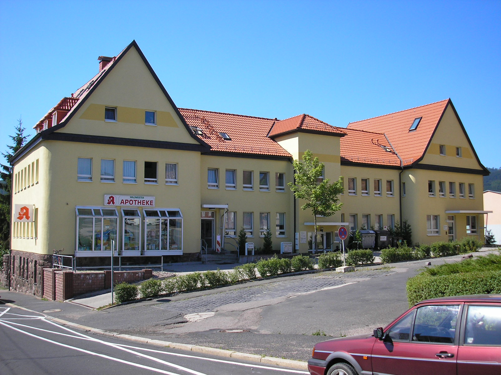 Das "Alte Ärztehaus" in Ilmenau (Thüringen). Erbaut in den 1920er-Jahren.